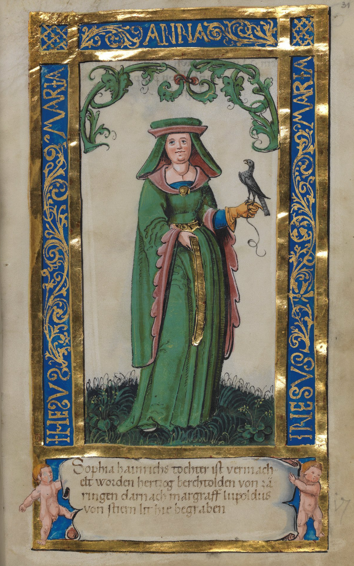 Weingartener Stifterbüchlein, Württembergische Landesbibliothek Stuttgart, Cod.hist.qt.584, fol. 31r, Stifterbild Sophia, Tochter Herzog Heinrichs des Schwarzen, Ehefrau des Markgrafen Leopold I. von Steiermark Sophia hainrichs tochter ist vermachelt worden hertzog berchtolden von zäringen darnach margraff lupoldus von stiern lit hie begraben